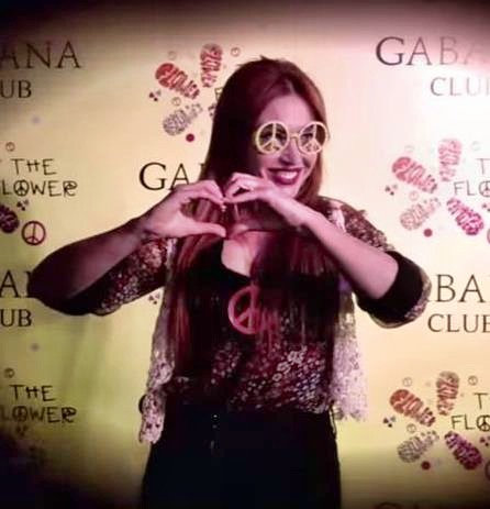 Silvia Fominaya.